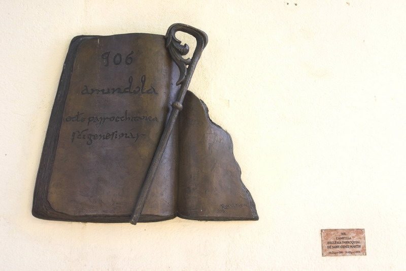 Placa commemorativa dels 1100 anys de la fundació: Església de Sant Genís a l'Ametlla del Vallès (Vallès Oriental-Catalunya), 2006.